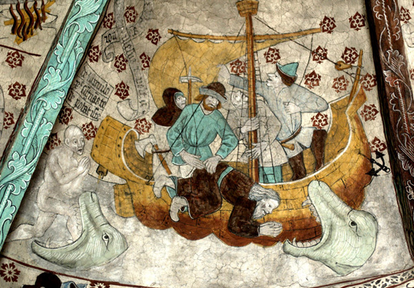 Kalkmålning i Härkeberga kyrka av Albertus Pictor: Profeten Jona kastas i havet och uppslukas av den stora fisken.